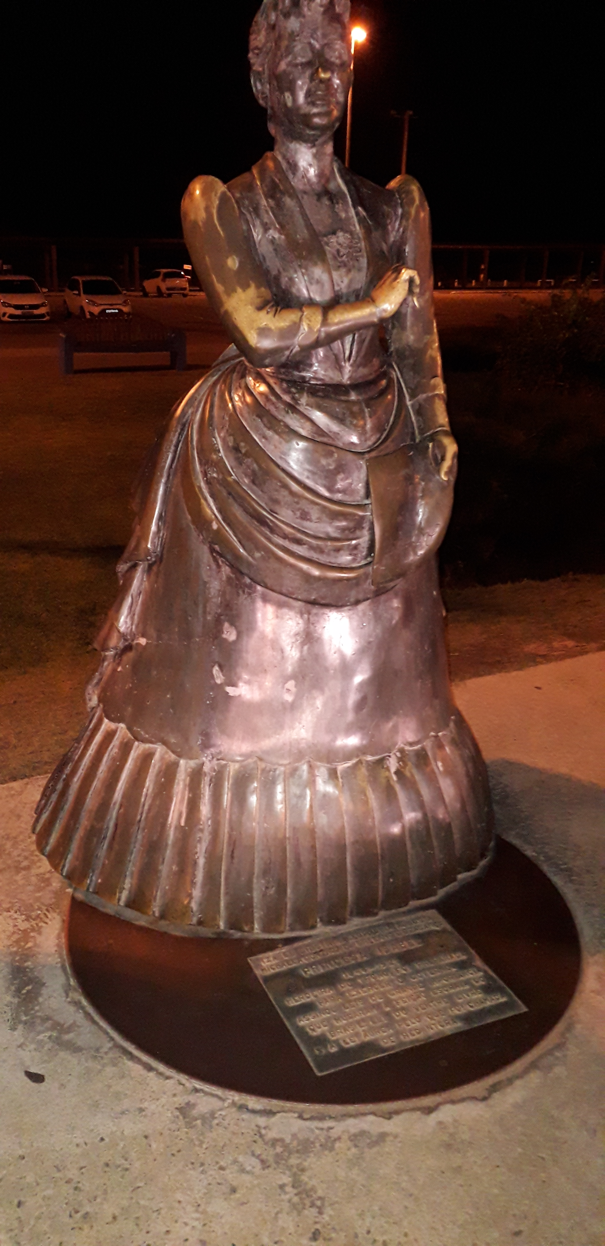 Imagens do Monumento aos formadores de nacionalidade, composto de várias esculturas na e instalado na Avenida Santos Dumont, orla de Atalaia, Aracaju, Sergipe.